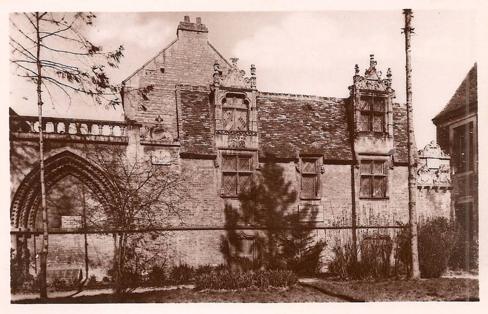 ancienne cour du musée des antiquaires avec sa façade du 16e remontée au 19e sur une aile de l'ancien collège du Mont.